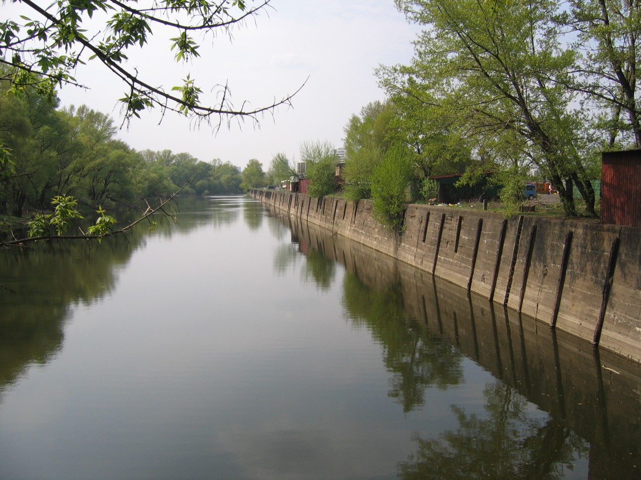 Warszawa, Port Praski